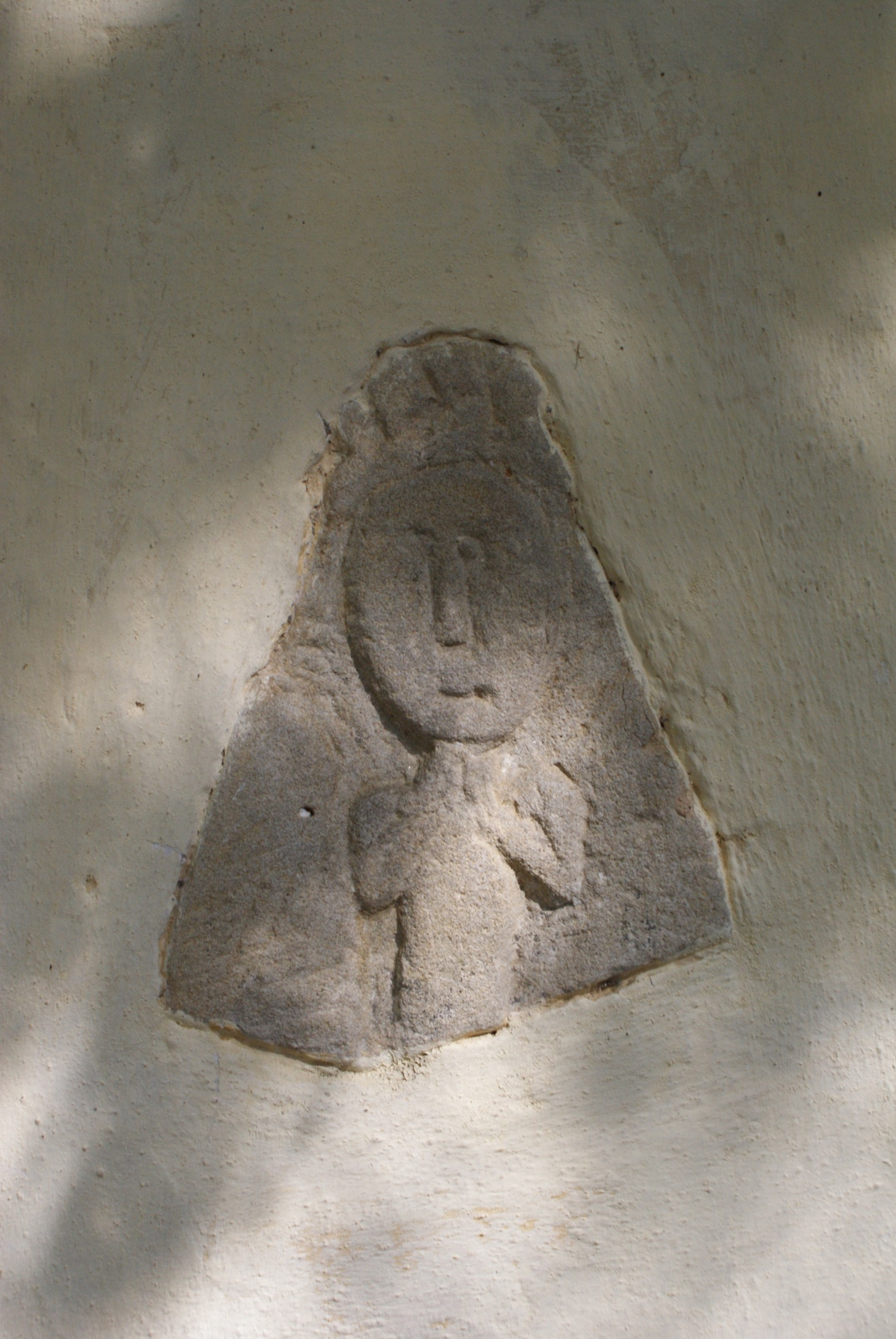 Kath. Filialkirche hl. Christoph am Hum